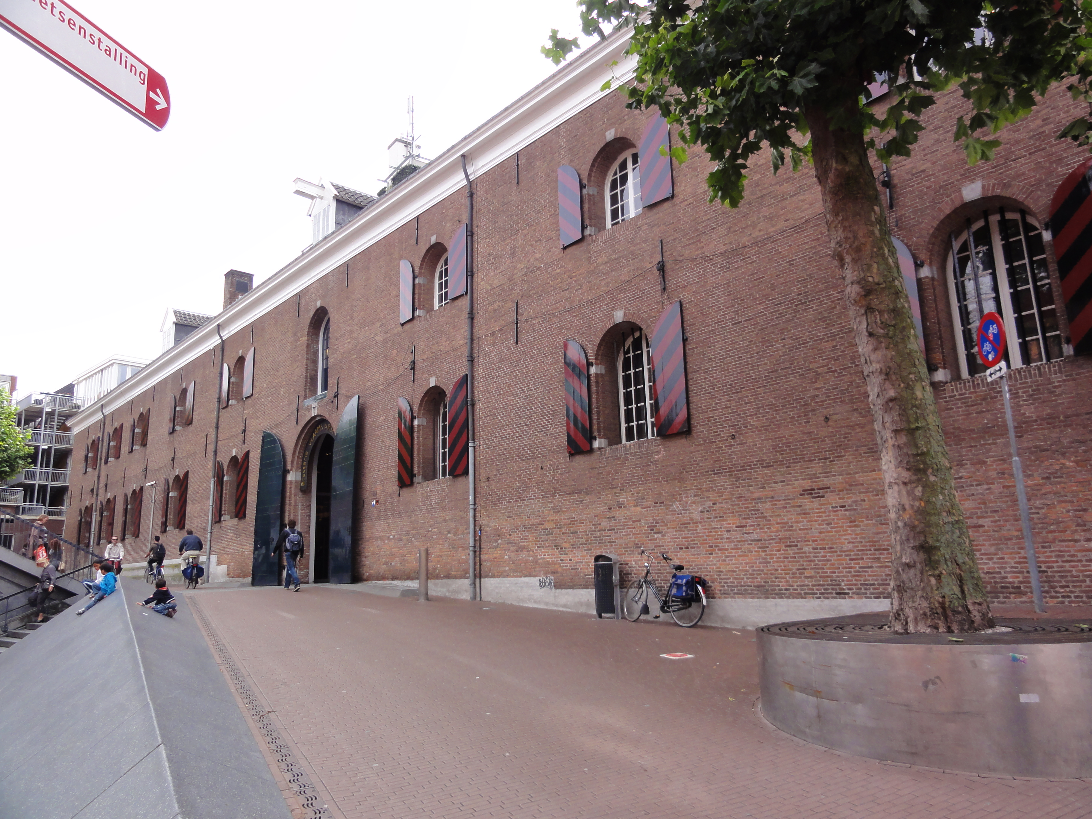 Nijmegen Rijksmonument 31156 Het Arsenaal 1″ N, 5° 51′ 55.64″ E Object location51° 50′ 42.12″ N, 5° 51′ 56.27″ E